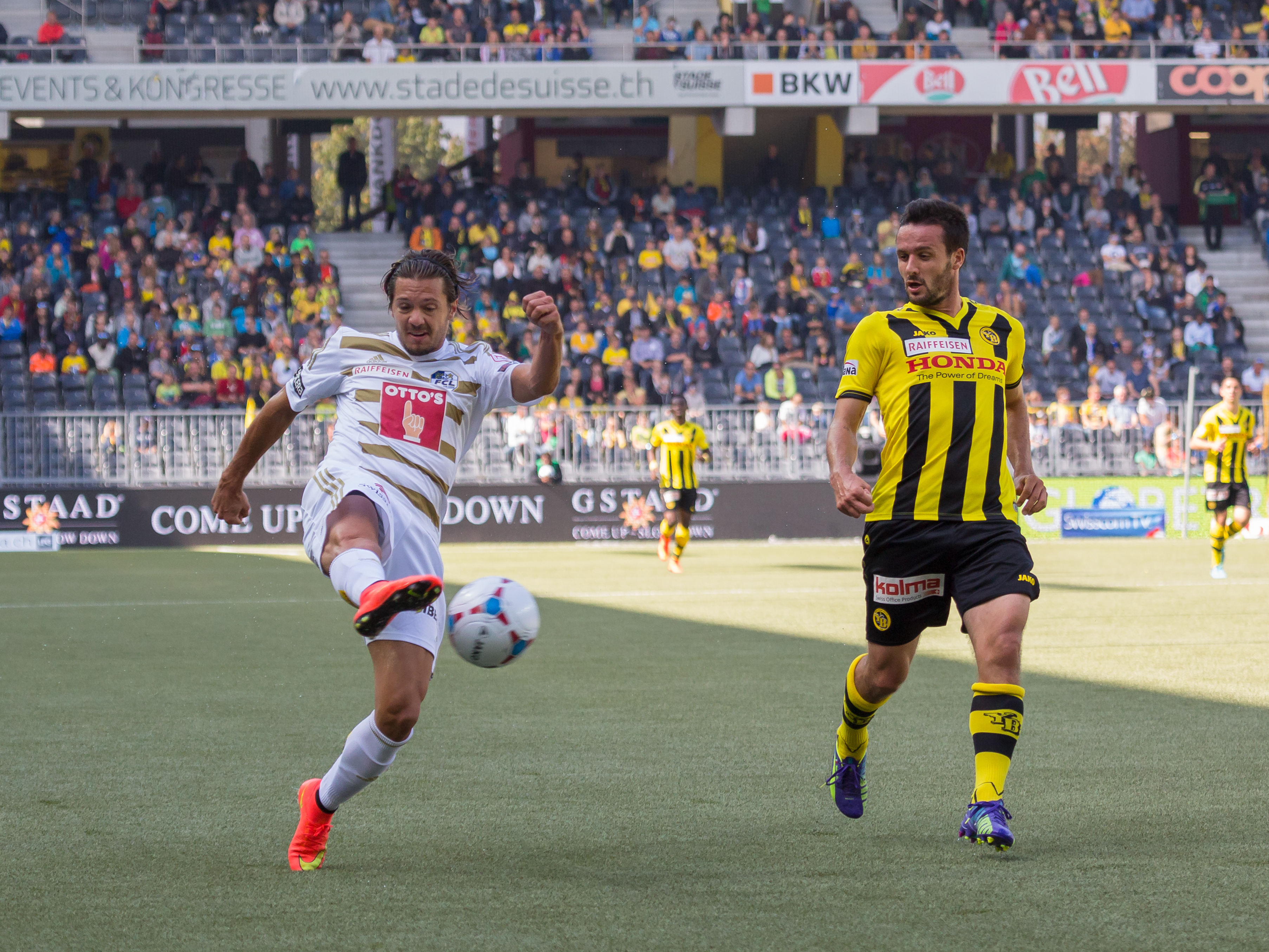 Adrian Winter beim Spiel des BSC Young Boys gegen den FC Luzern; rechts Raphaël Nuzzolo